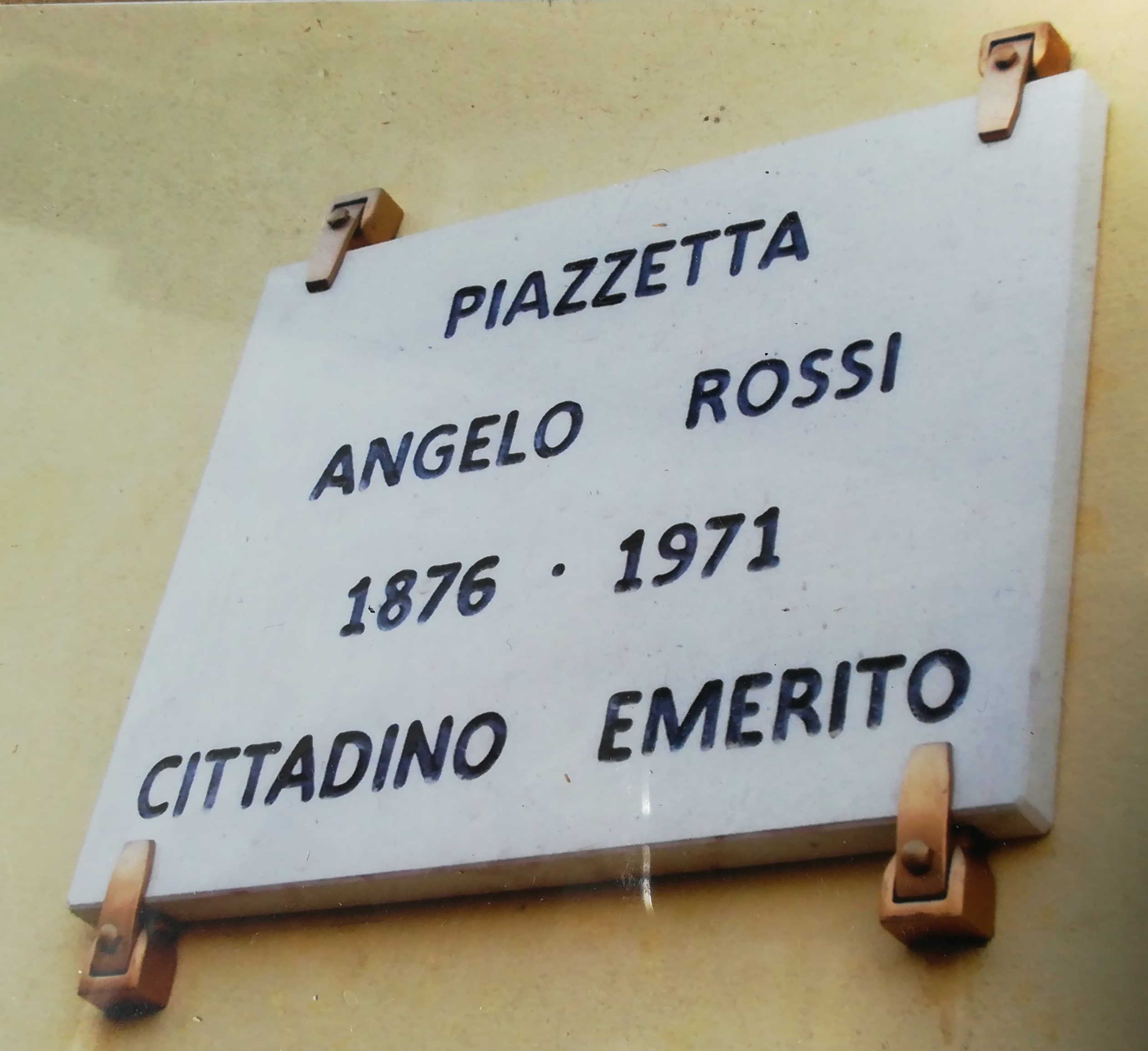 Piazzetta Angelo Rossi - Comune di Montecorice - località Assunta di Cosentini